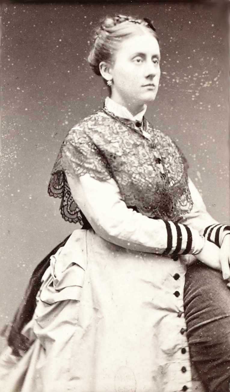 "Album de portraits cartes de visite ayant appartenu à Édouard Manet", Date d'édition : 1860-1883, Format : 1 album de 193 photogr. pos. sur papier albuminé, d'après des négatifs sur verre au collodion ; 31 x 24 cm (vol.), Source : Bibliothèque nationale de France, département Estampes et photographie, 4-NA-115